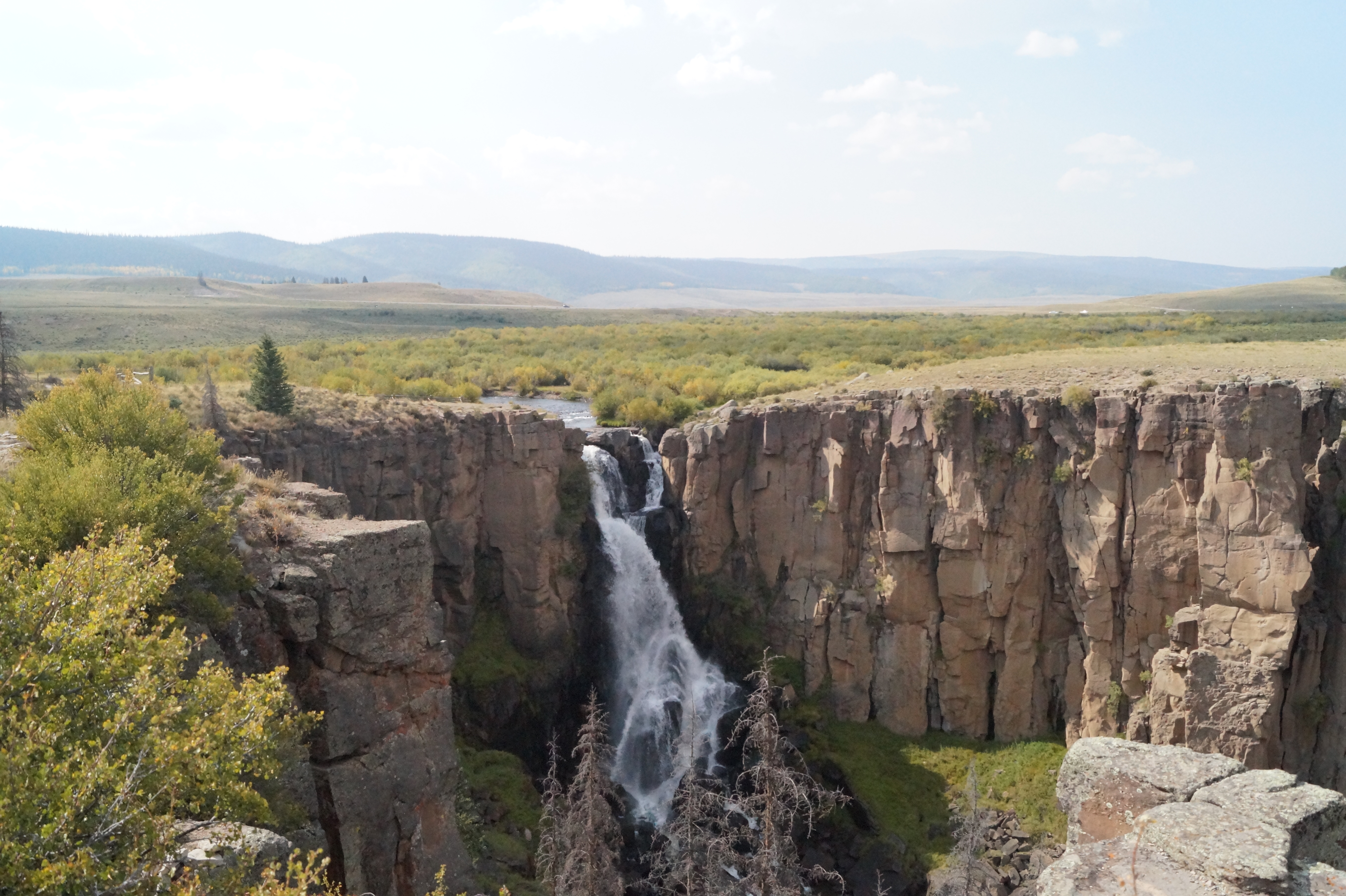 North Clear Creek Falls 2017